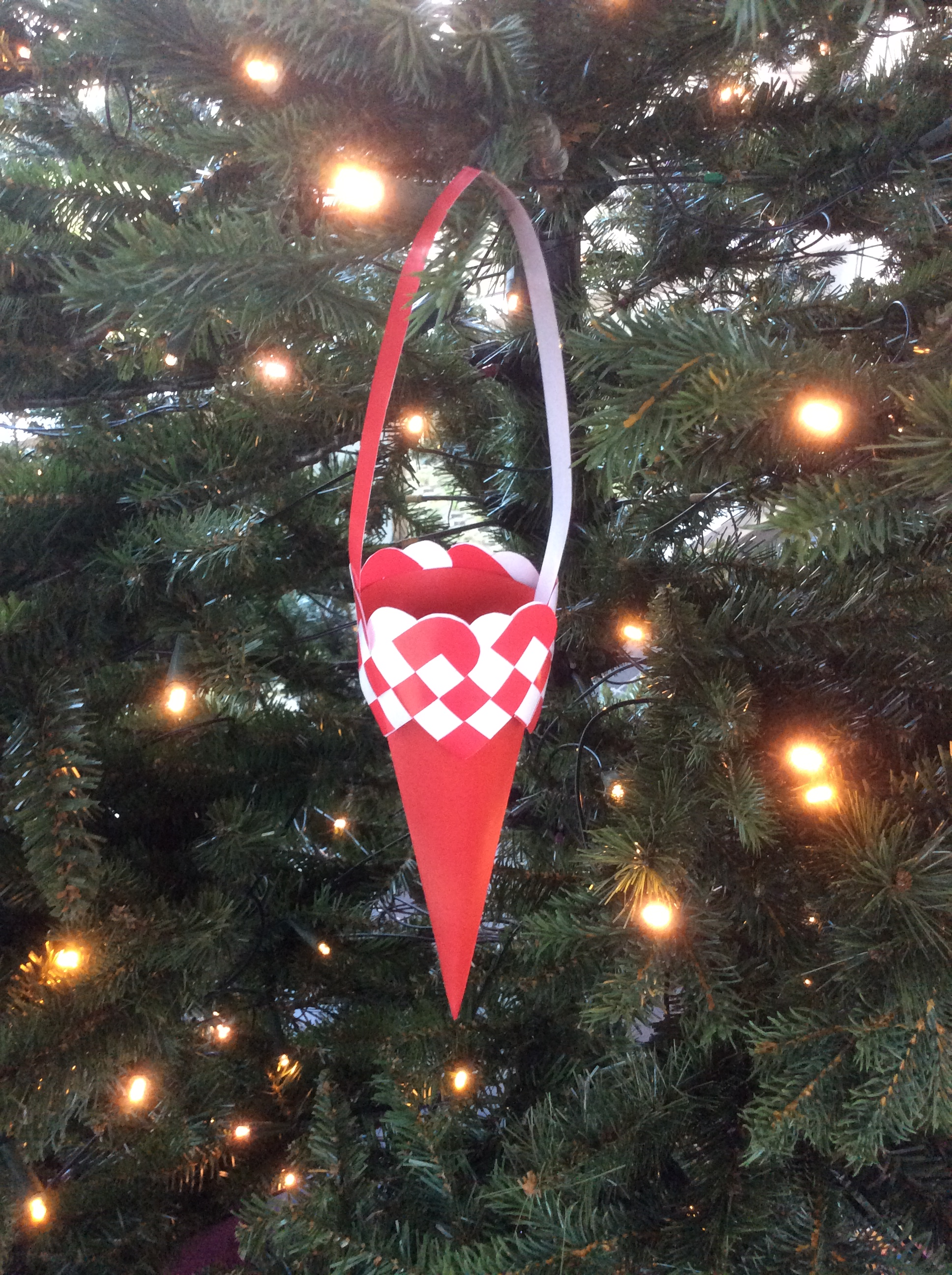 Kræmmerhus i pap og papir med kant af flettede hjerter